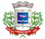 oficial